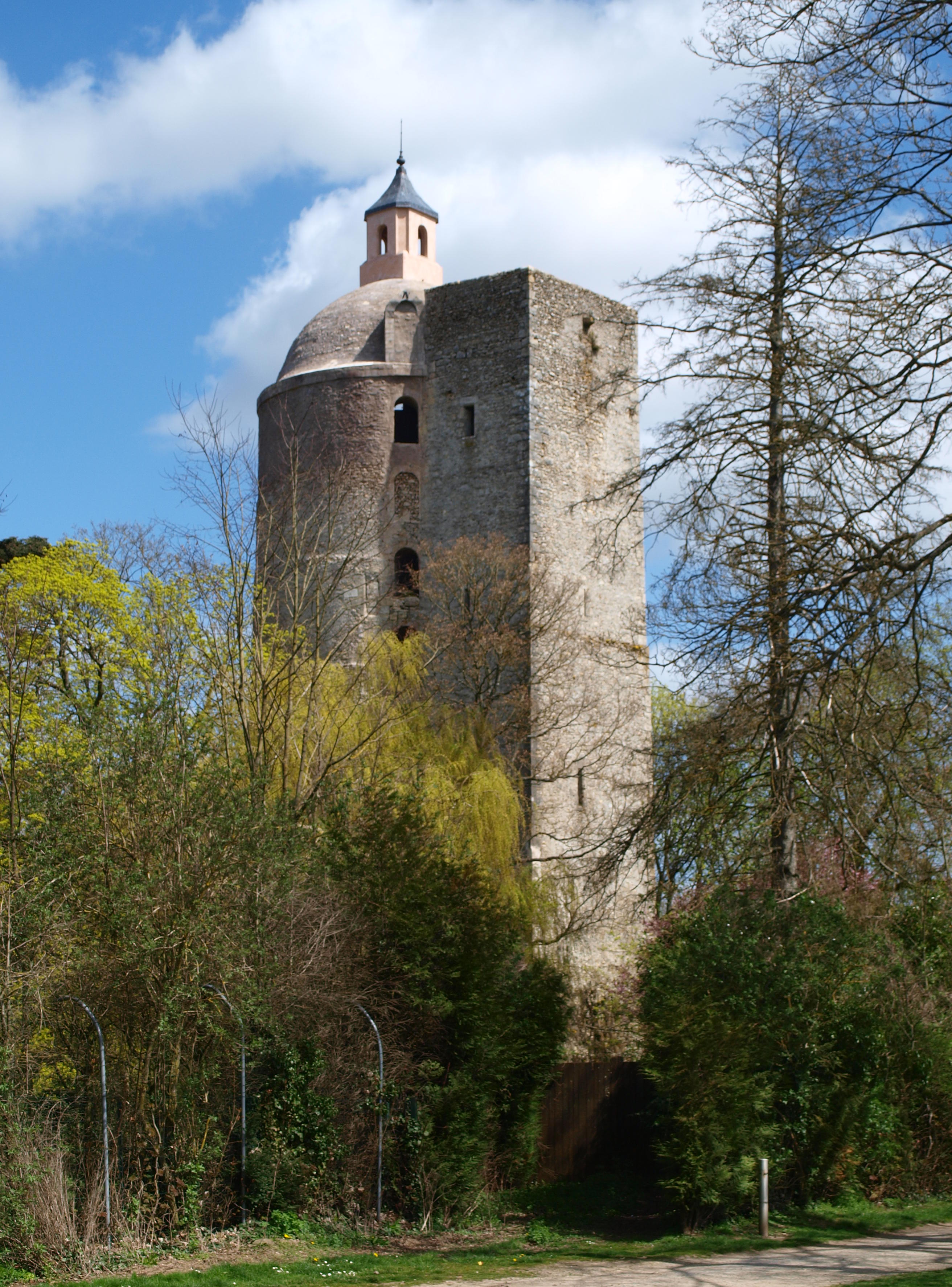 Auneau, Eure-et-Loir, France) ; donjon du château.